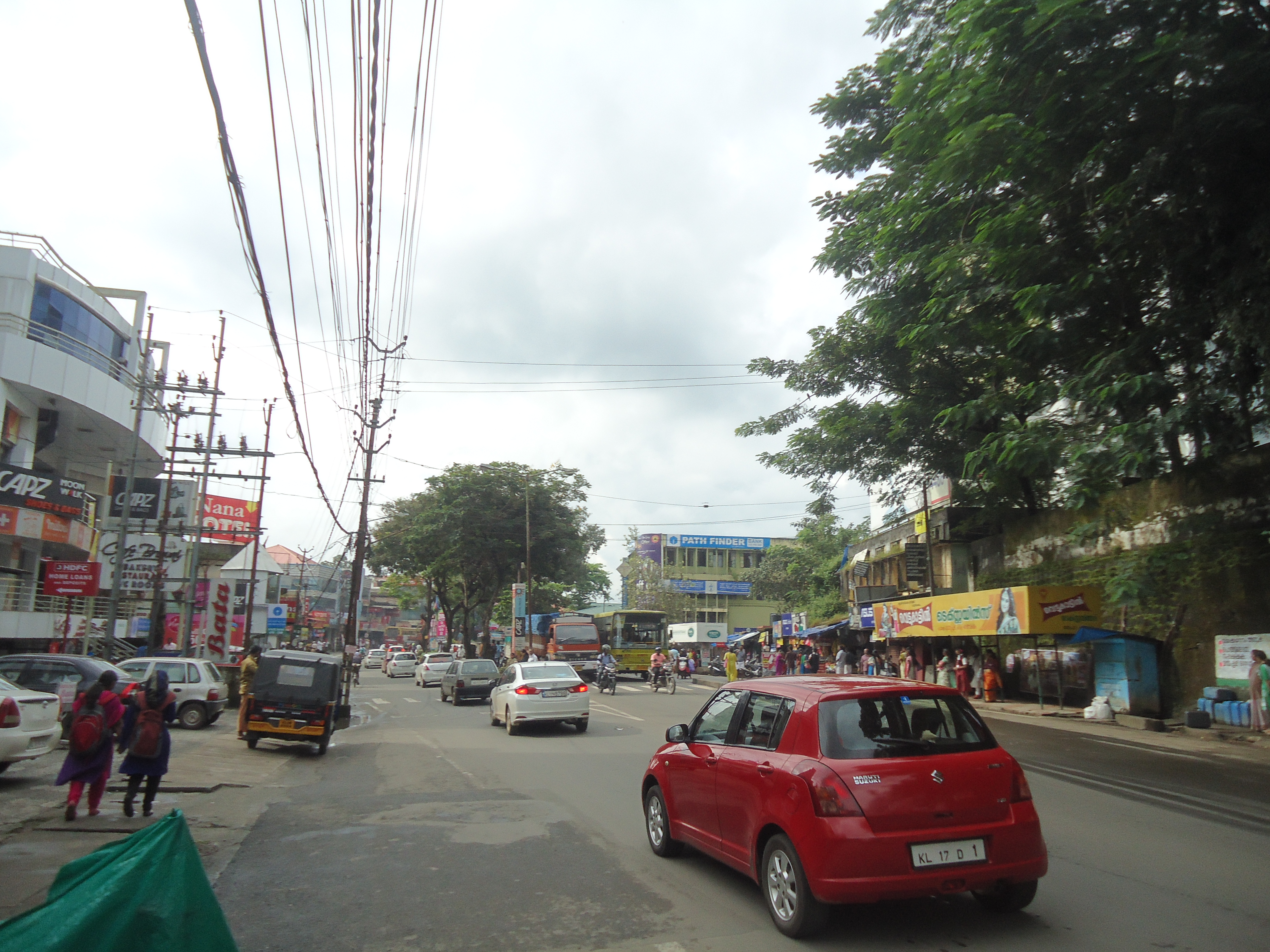 Muvattupuzha Town